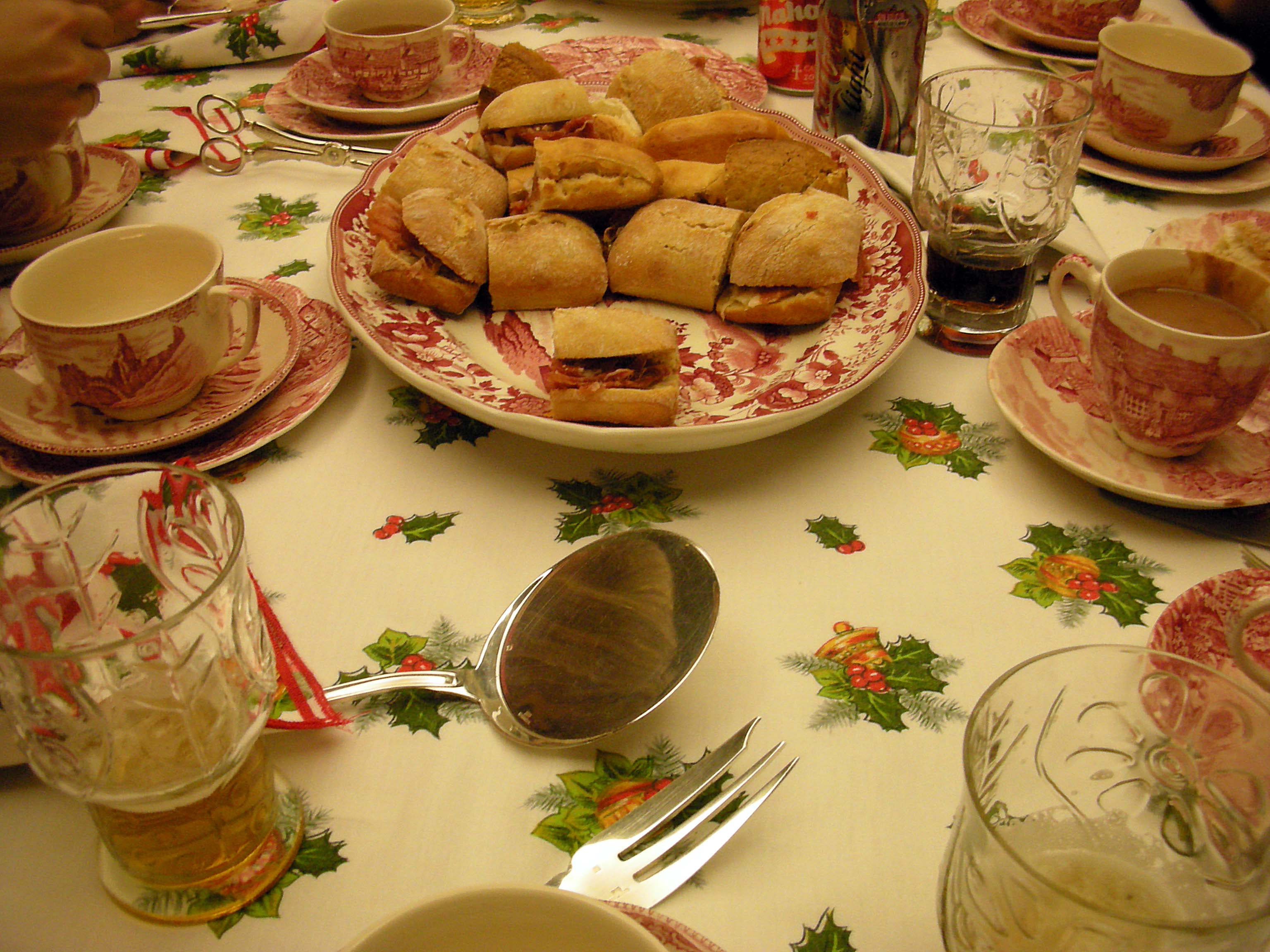 Naturaleza muerta